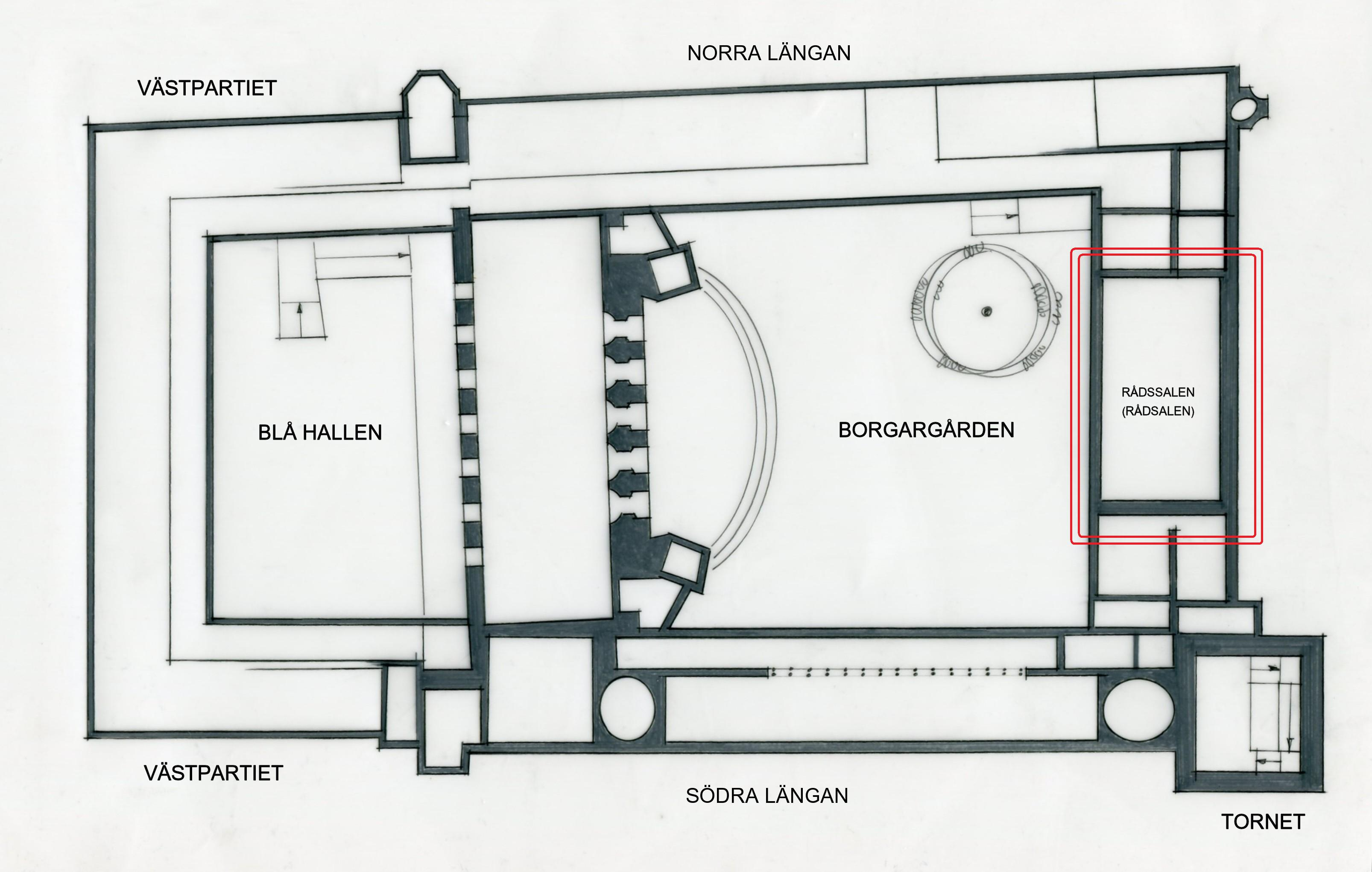 Stockholms stadshus översiktsplan våning 1 trappa, Rådssalen